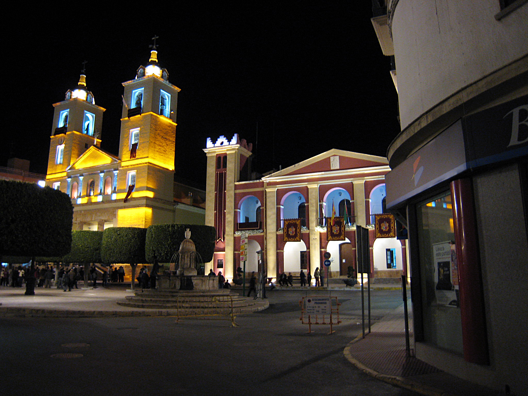 Plaza de la Constitución de Berja, de noche